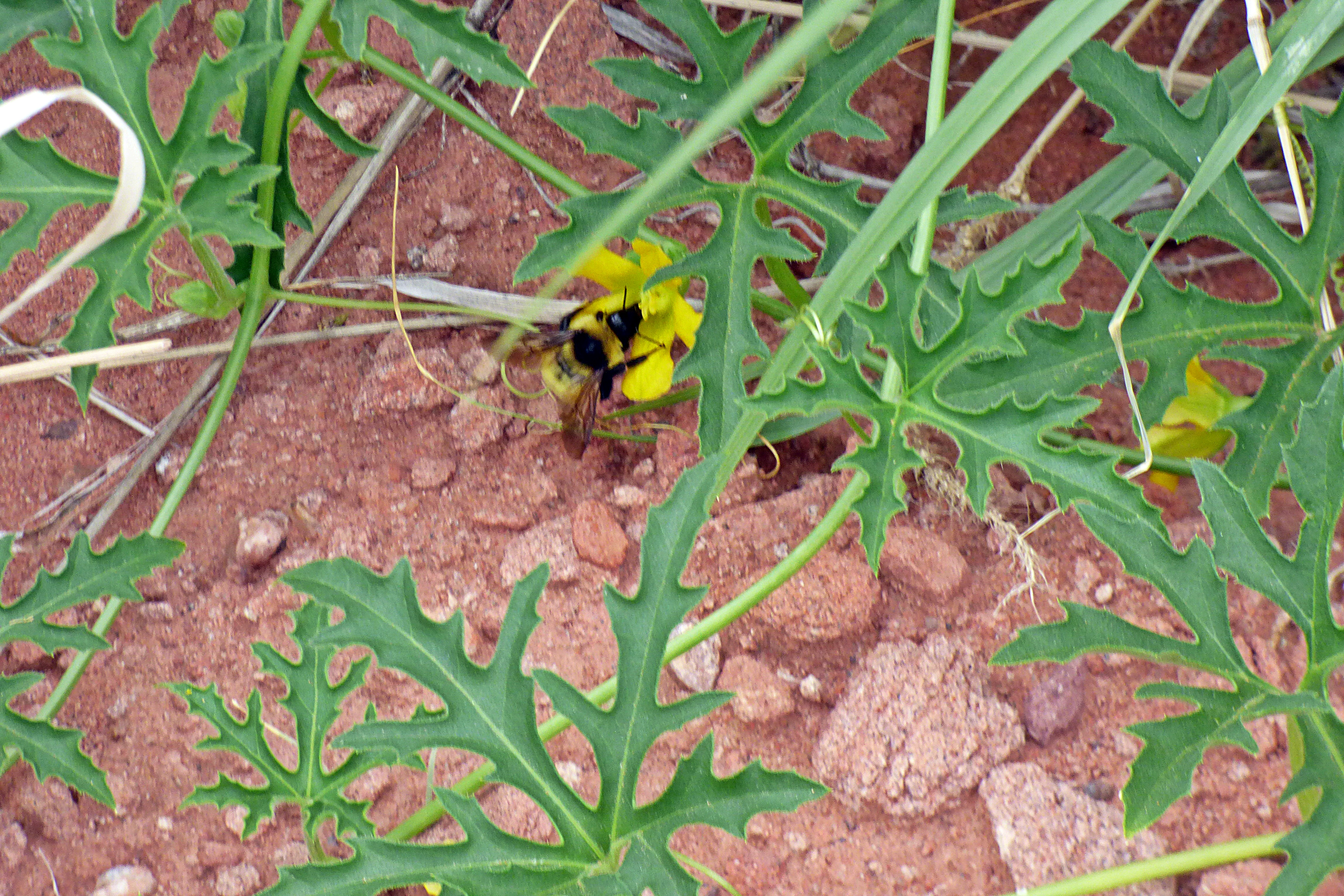 Abejorro en flor de sandía del zorro (Cucurbitella asperata)